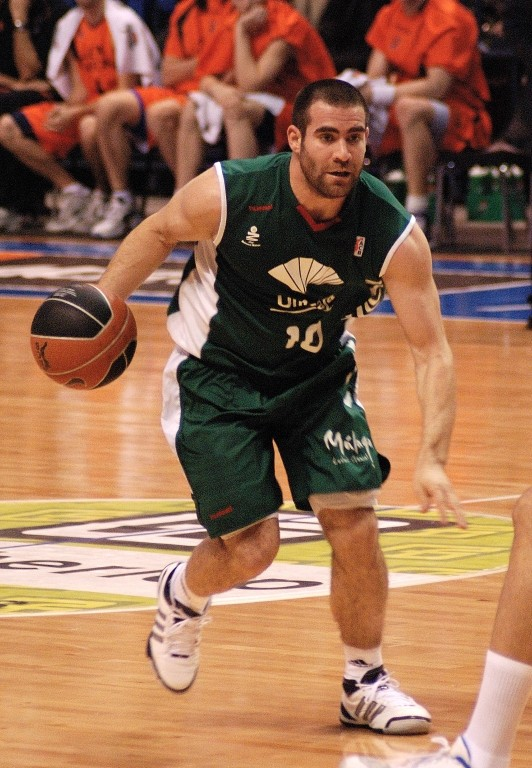 El jugador de baloncesto Carlos Cabezas en 2008